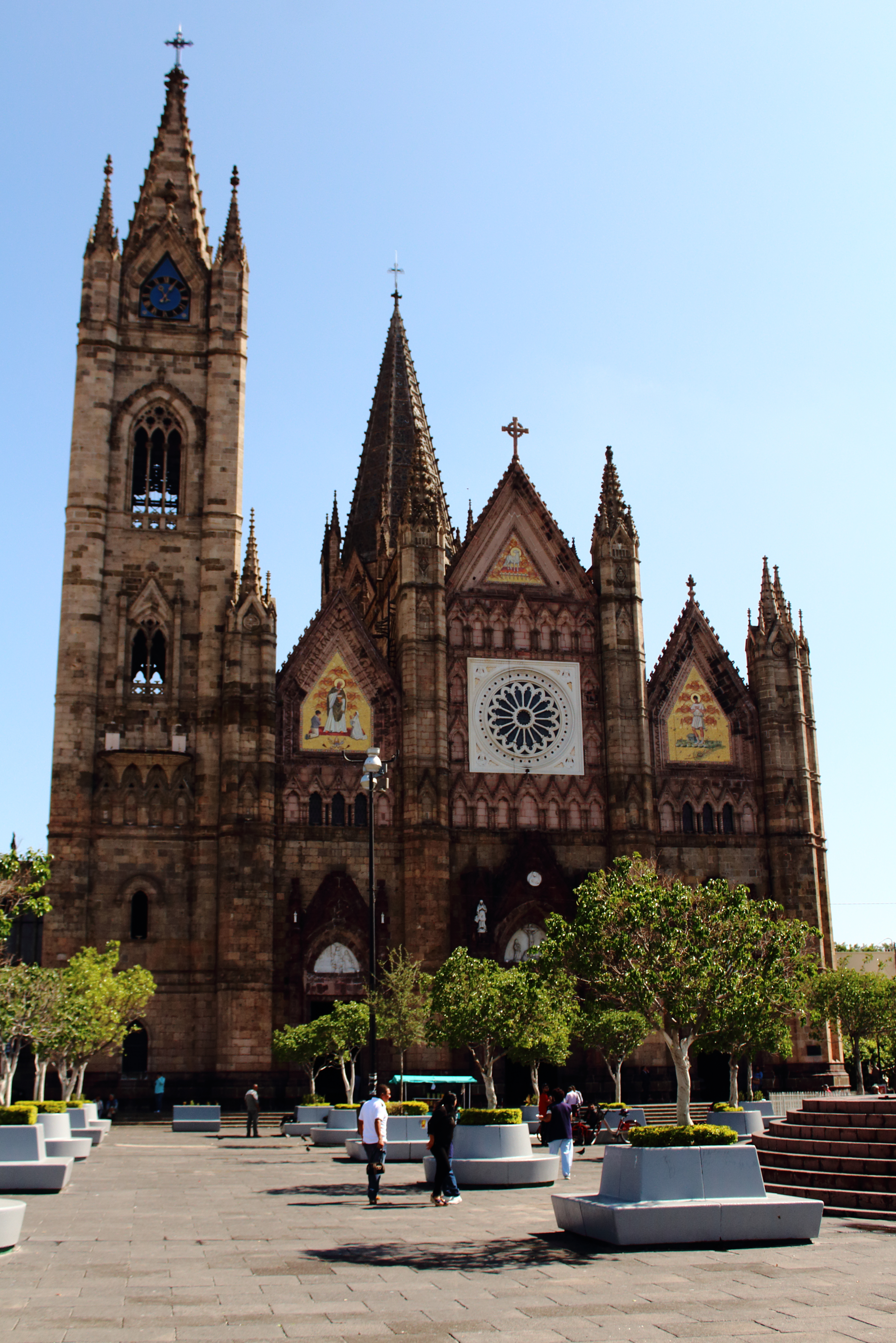 Templo Expiatorio del Santísimo Sacramento de estilo neogótico. Su construcción comenzó el 15 de agosto de 1897 y terminó 75 años después en 1972.